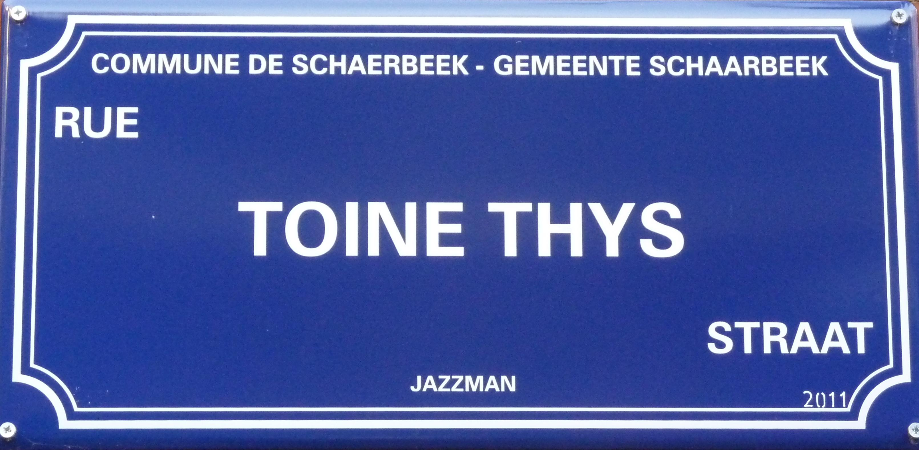 Le Mur des Célébrités à la Maison des Arts de Schaerbeek, Bruxelles, Belgique.